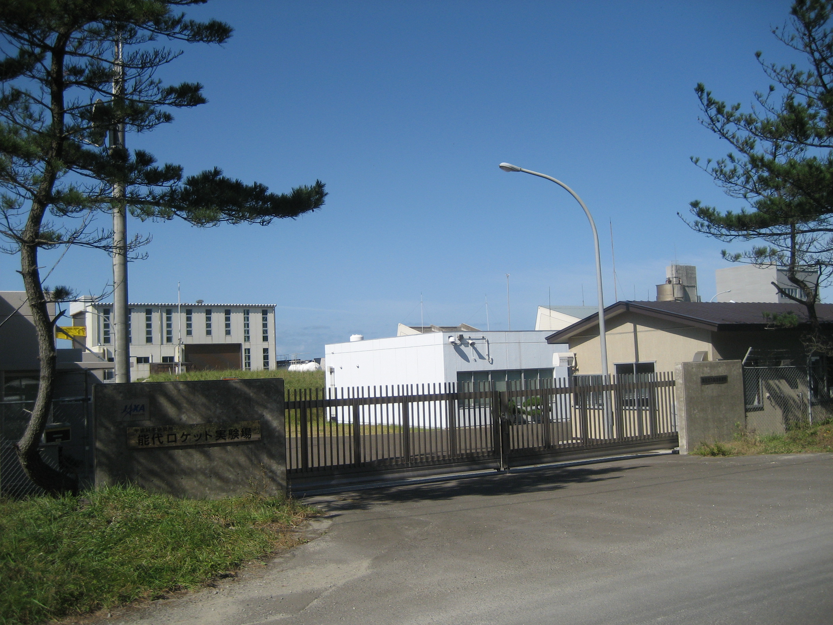 宇宙航空研究開発機構 能代ロケット実験場（正門付近を撮影）